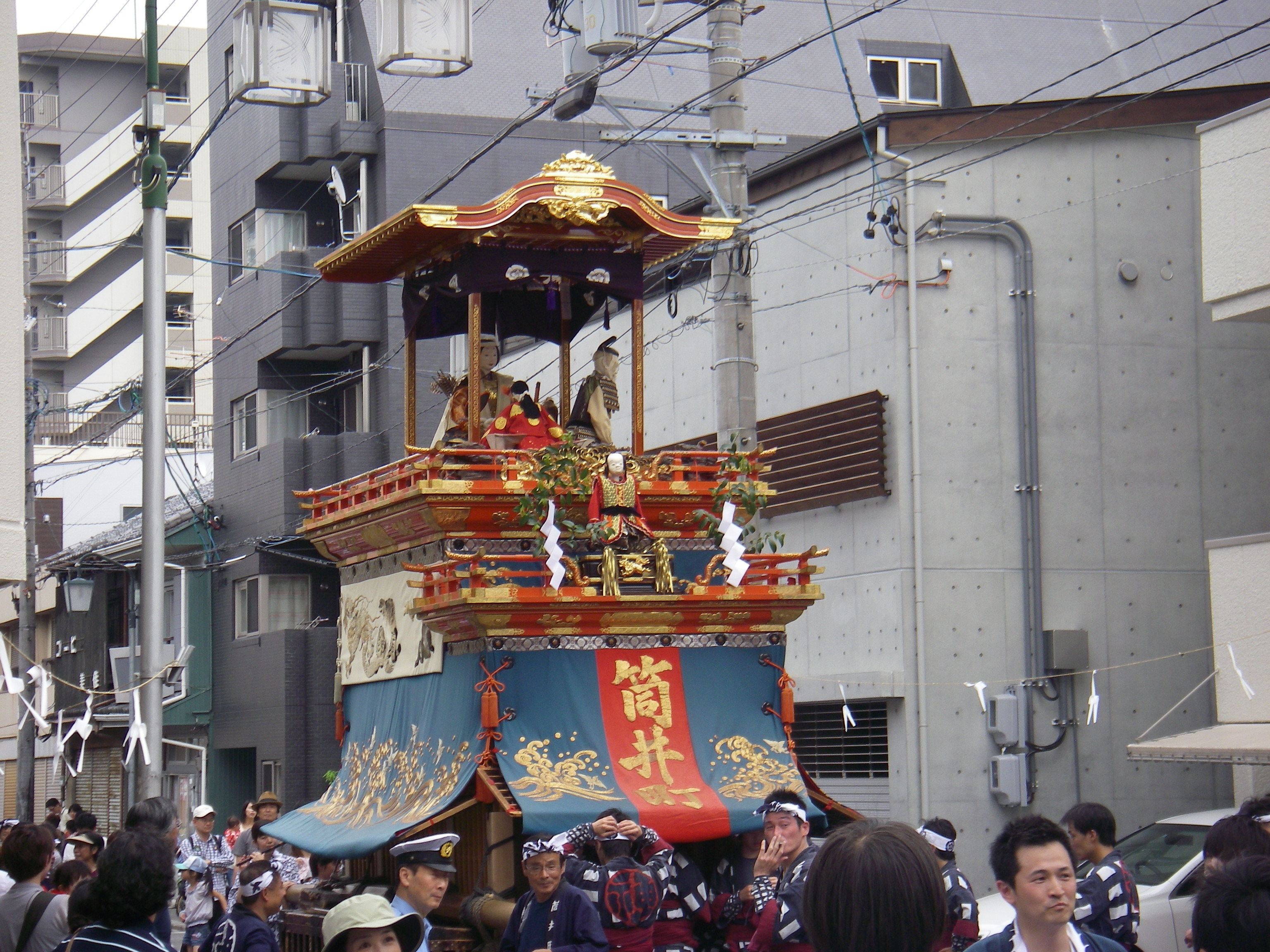 神皇車（名古屋市東区筒井）筒井地区にて